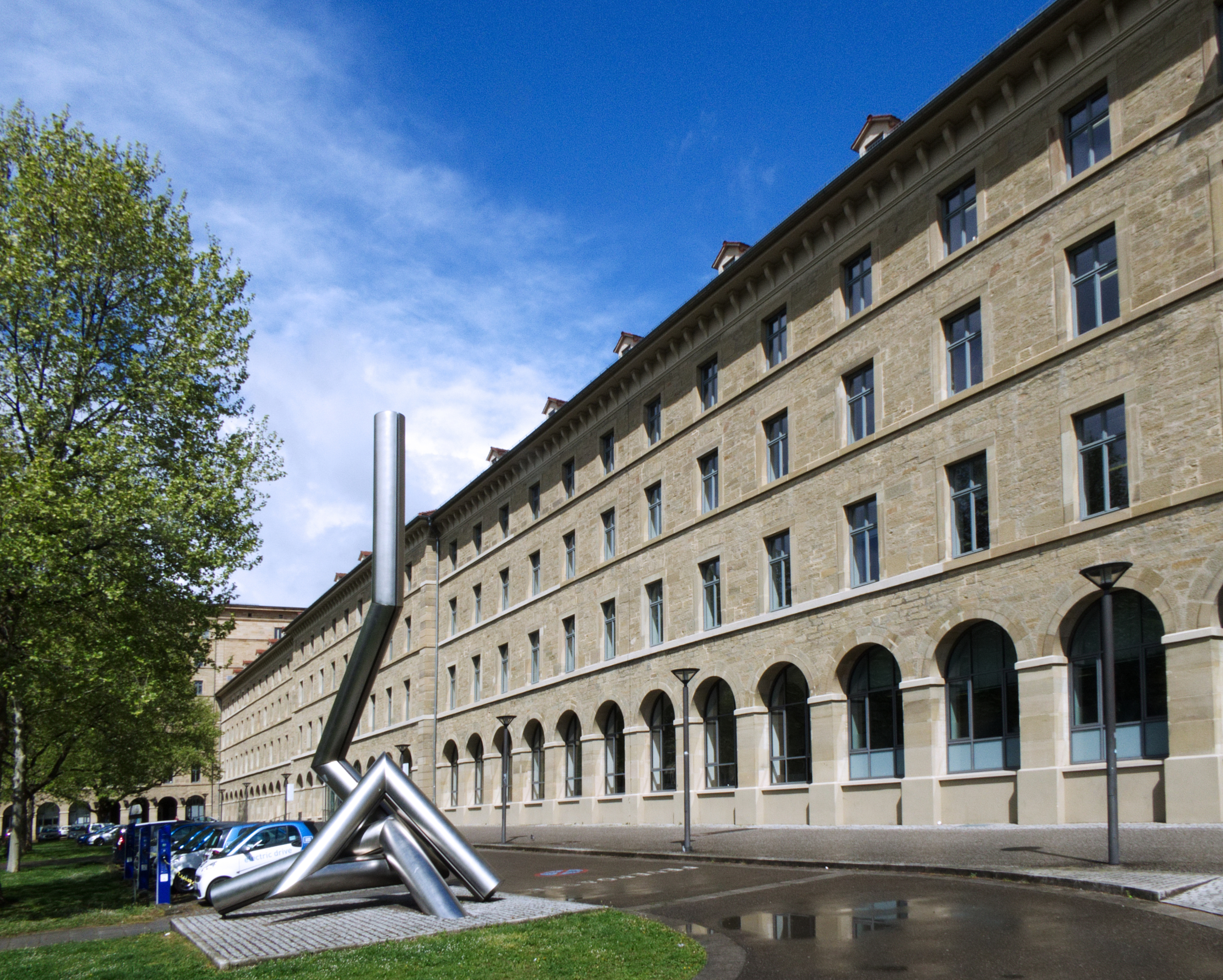 Nordost-Flügel des Rotebühlbaus (ehemalige Kaserne), Rotebühlplatz 30, Stuttgart. Erbaut 1827 und 1843 Johann Kaspar Vogel (Baurat) und Ludwig Friedrich Gaab (Hofbaumeister) im klassizistischen Stil. Geschützt nach § 2 DSchG. Links im Vordergrund: Röhrenplastik 8/73 von Erich Hauser